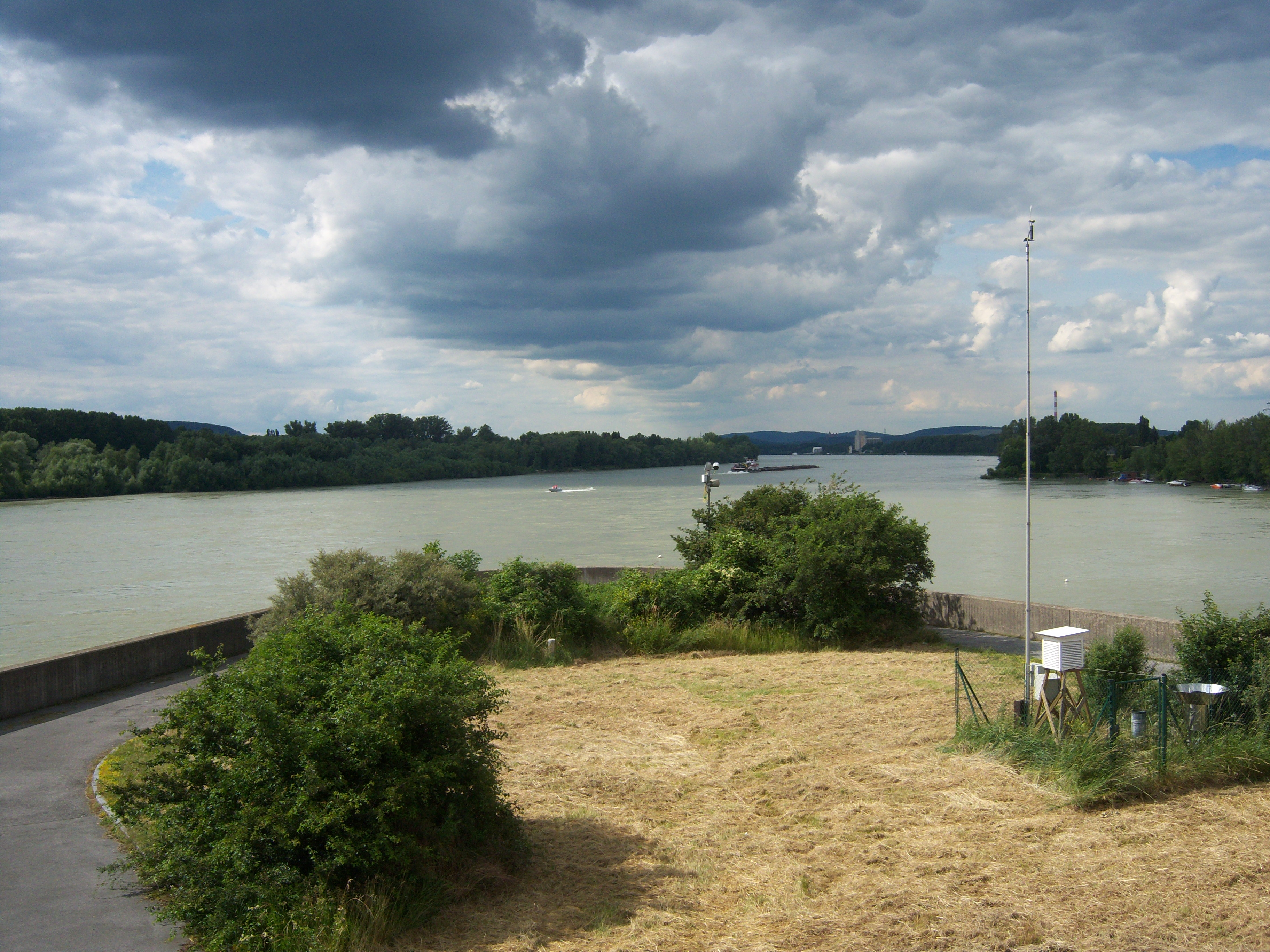 Beginn der Donauinsel